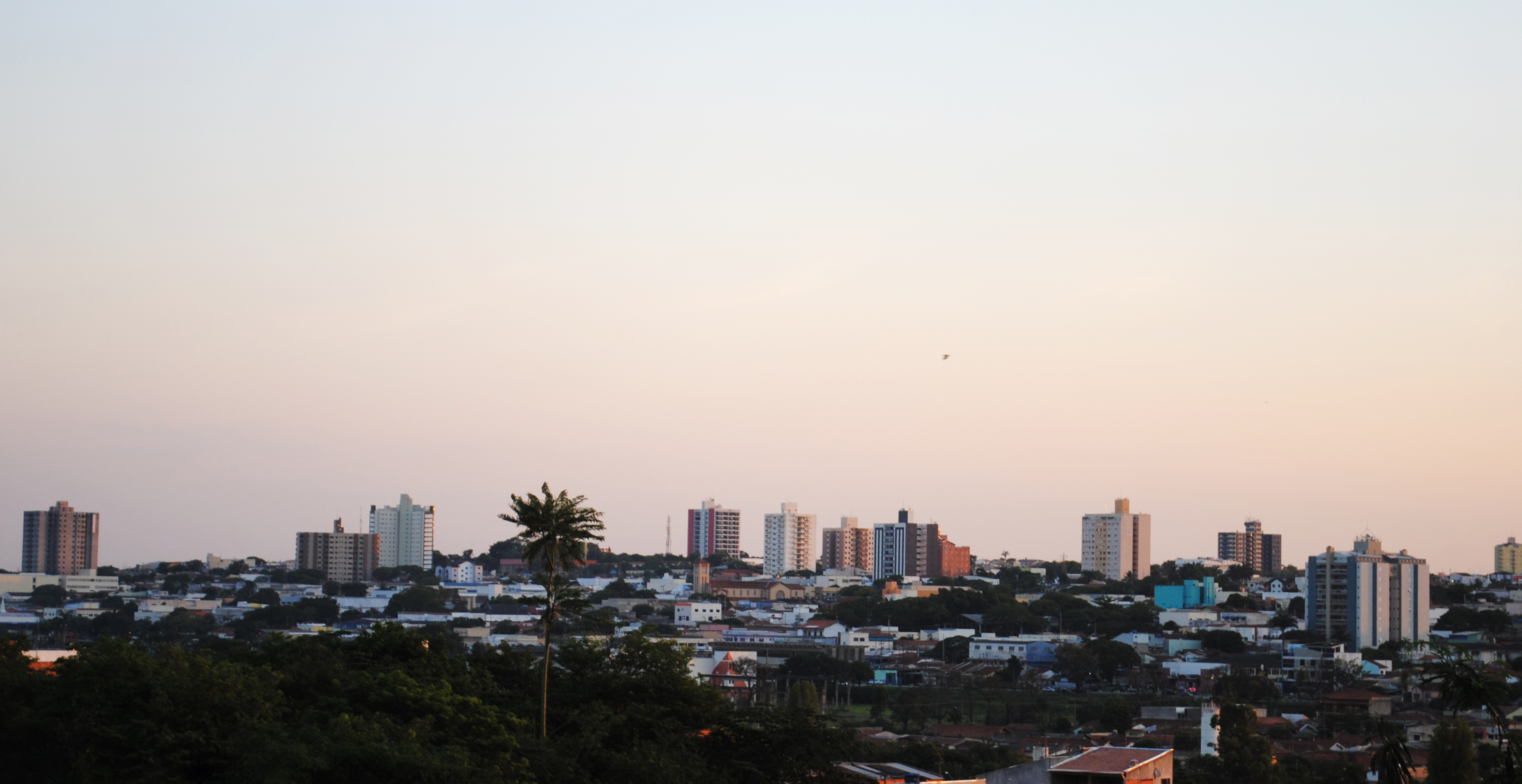 Foto panorâmica do centro de Sumaré.